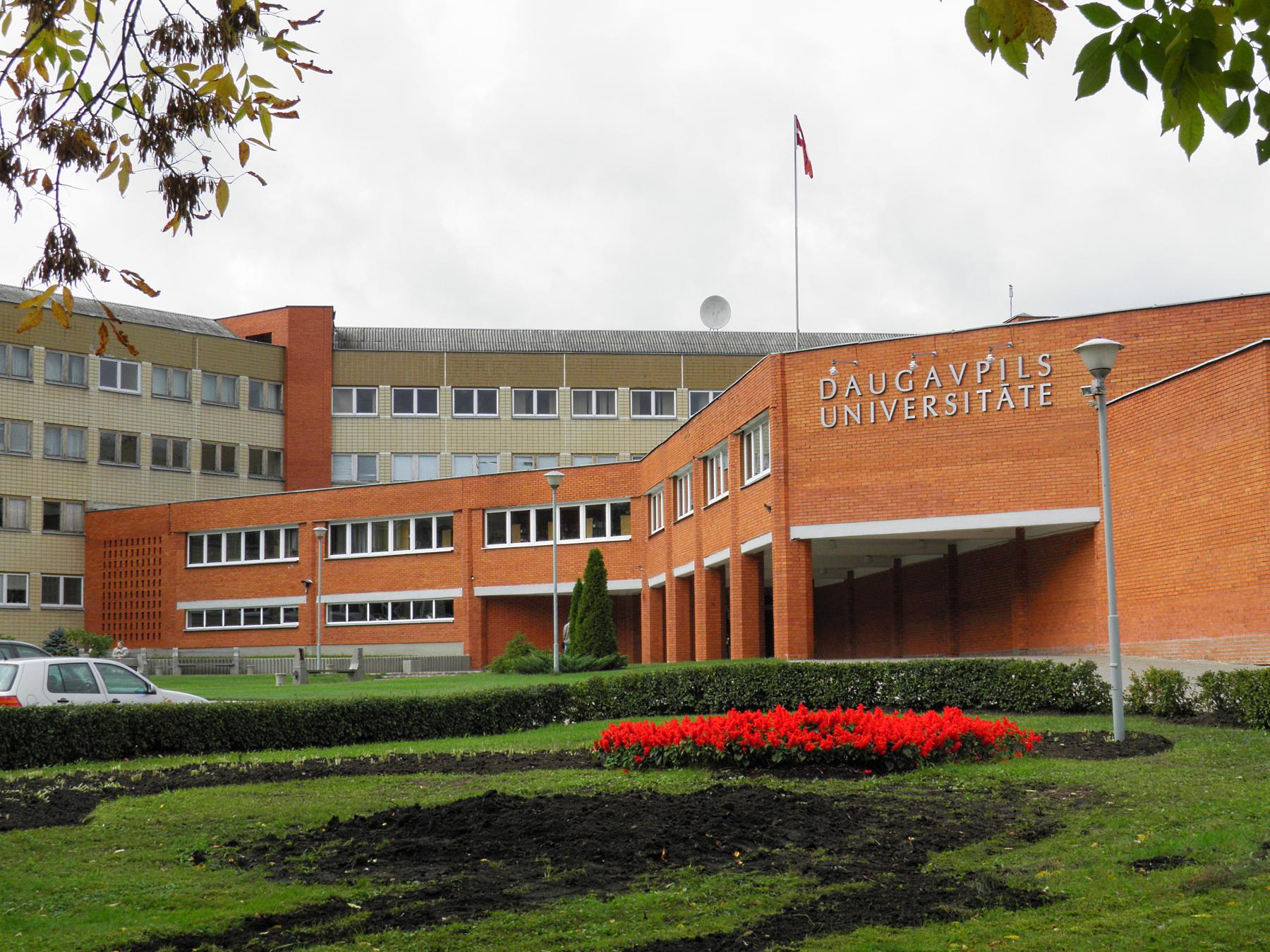 Даугавпилсский университет